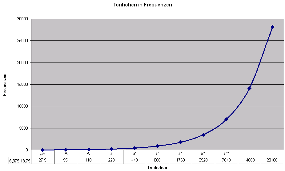 Tonhöhe